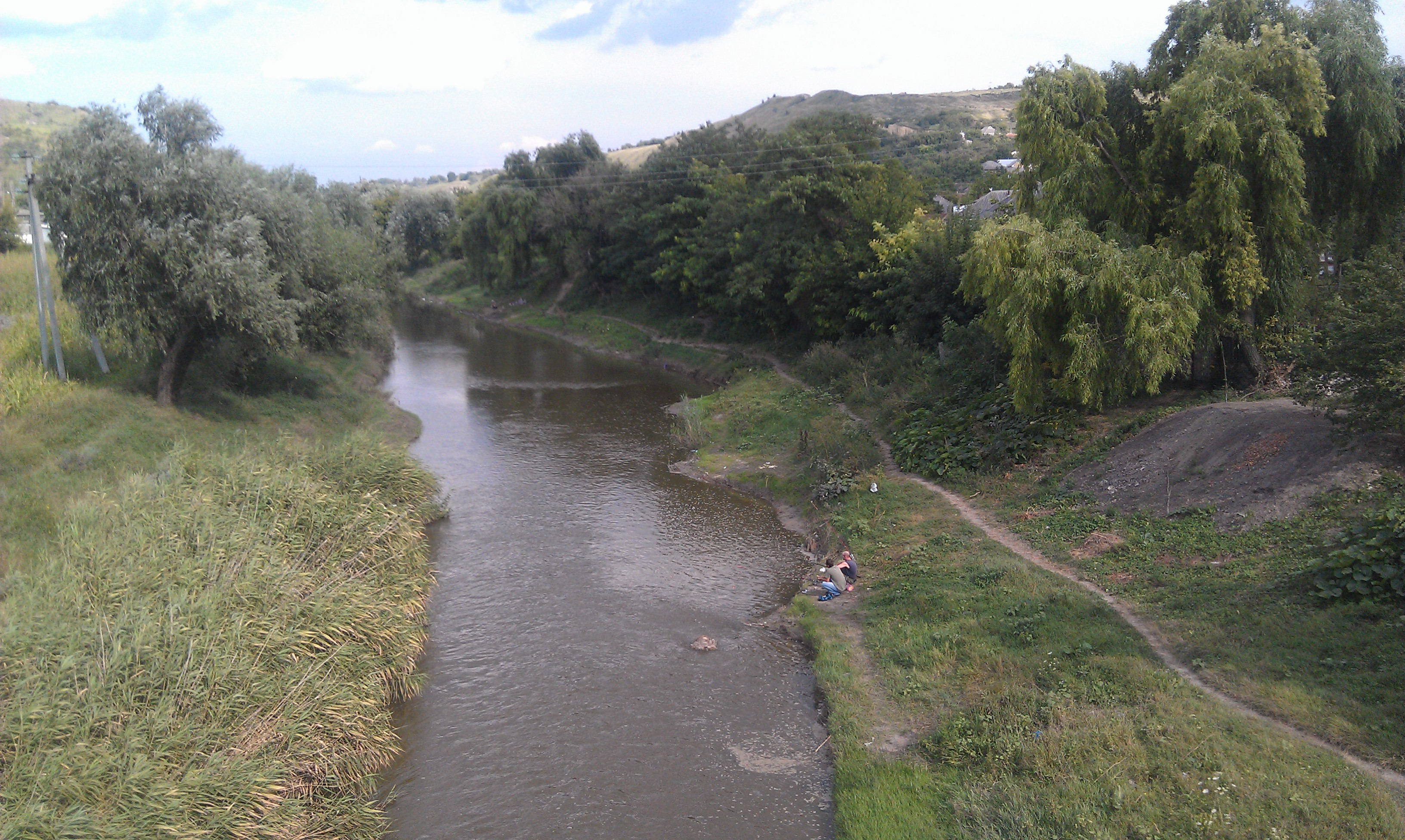 Вид с моста р. Реут в г. Оргеев